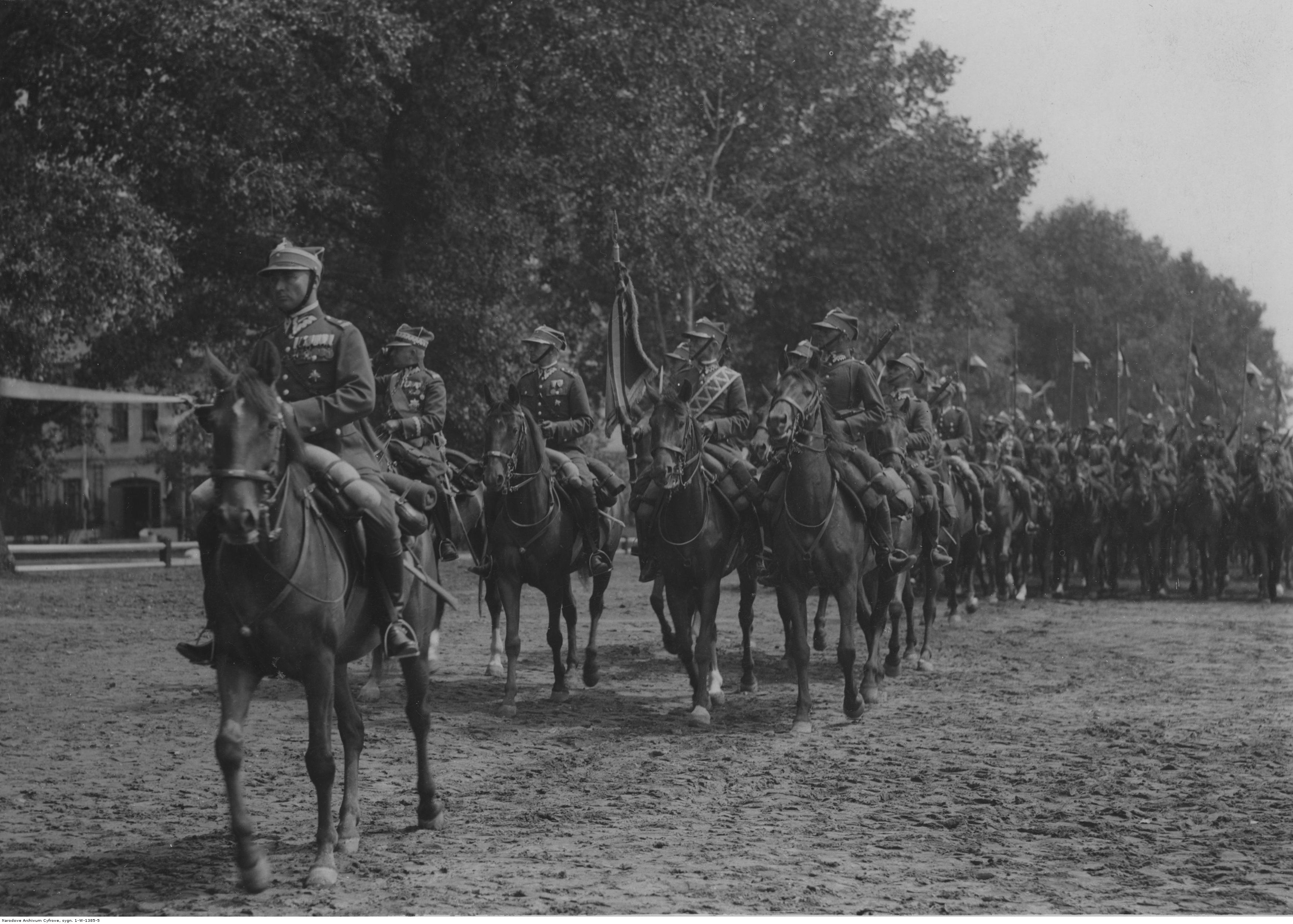 15-lecie 1 Pułku Ułanów Krechowieckich w Augustowie - defilada oddziałów konnych; lipiec 1932 r. Koncern Ilustrowany Kurier Codzienny - Archiwum Ilustracji Sygnatura: 1-W-1385-5